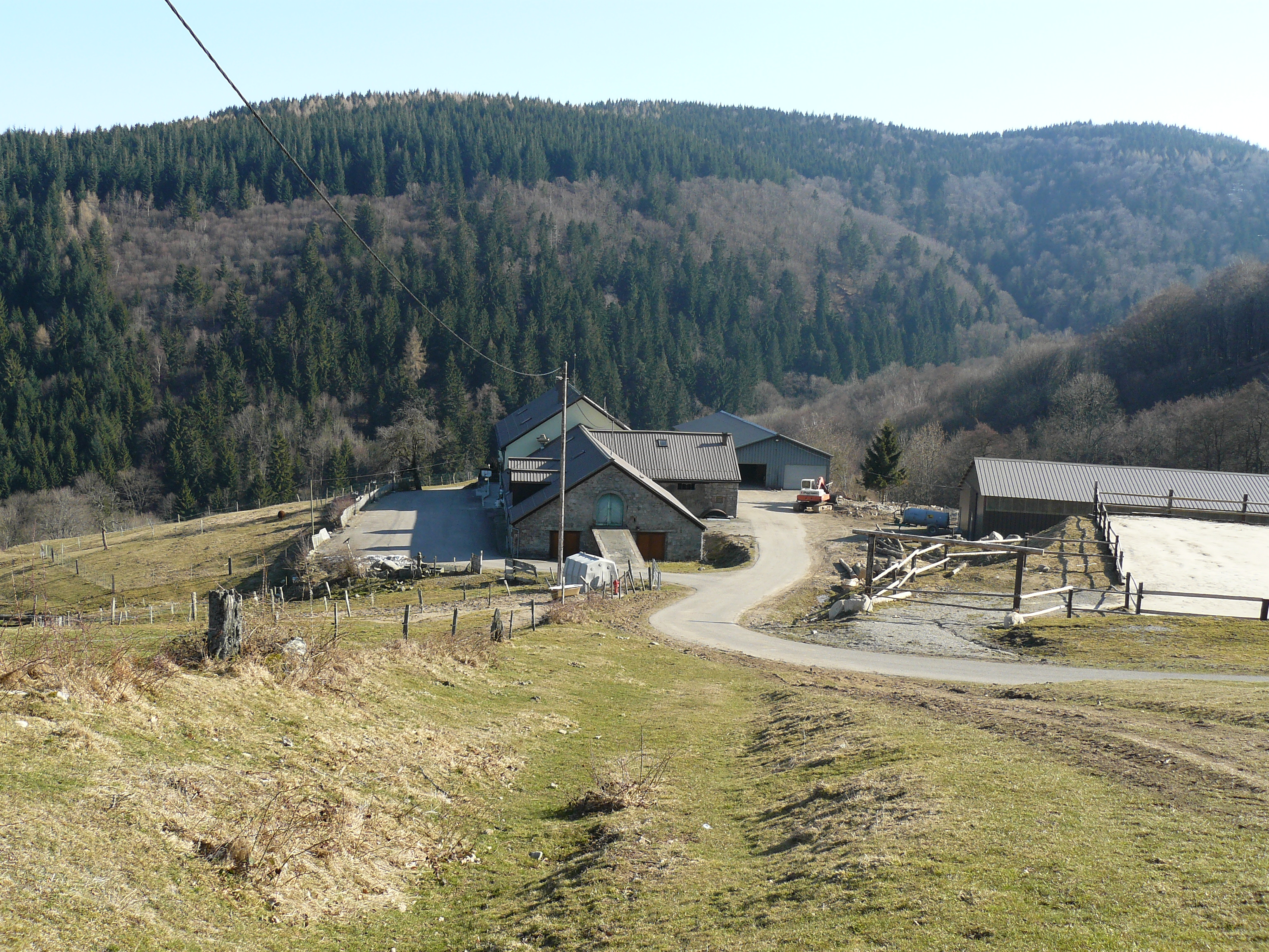 Ferme-auberge de la Glasshutte à Rimbach près Guebwiller